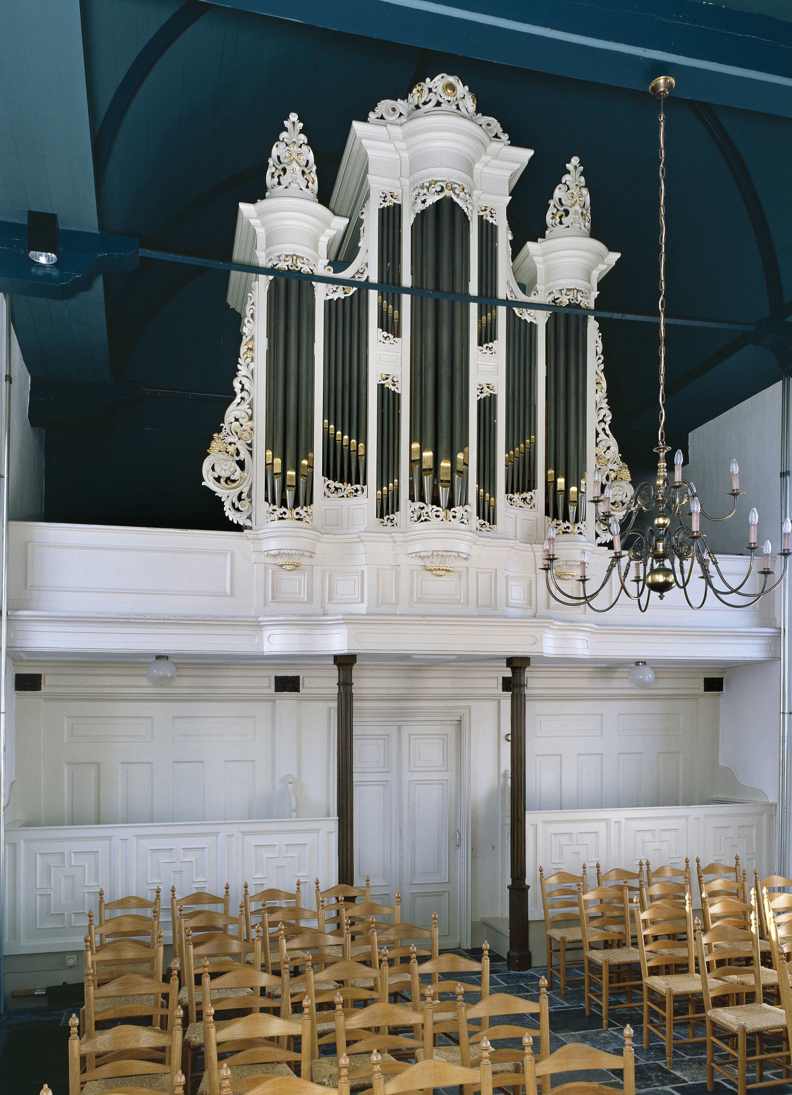 Nederlands Hervormde Kerk: Interieur, aanzicht orgel, orgelnummer 428 (opmerking: Gefotografeerd voor Het Historische Orgel in Nederland 1886-1894, bladzijde 154)